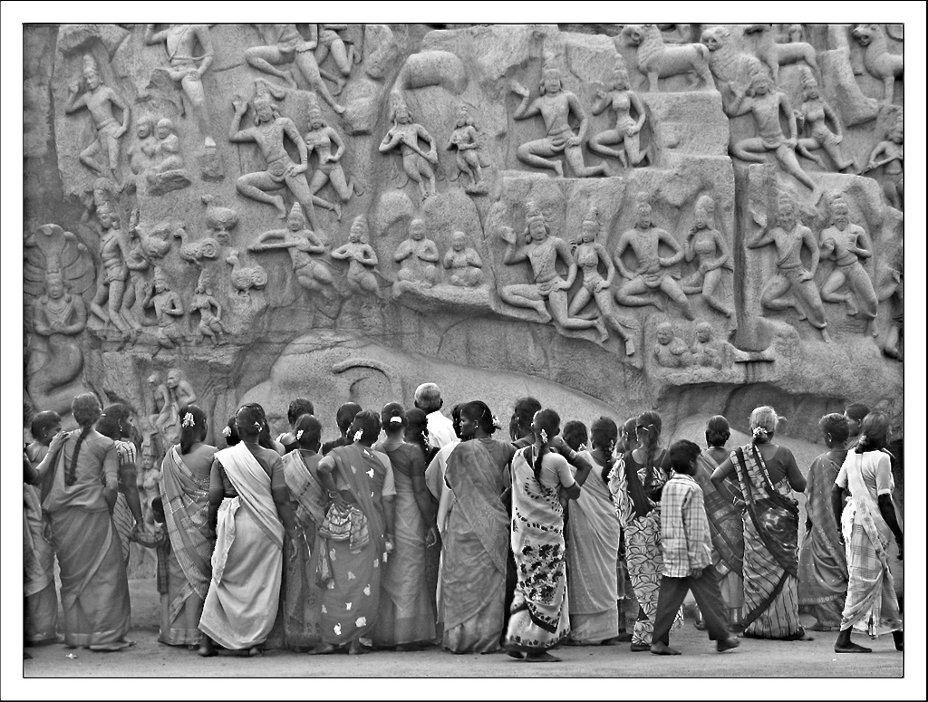 Mahabalipuram god charpam